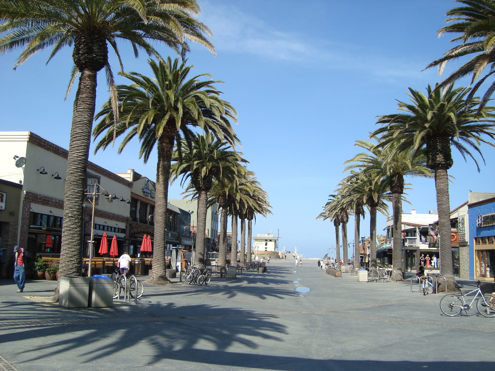 Hermosa Beach